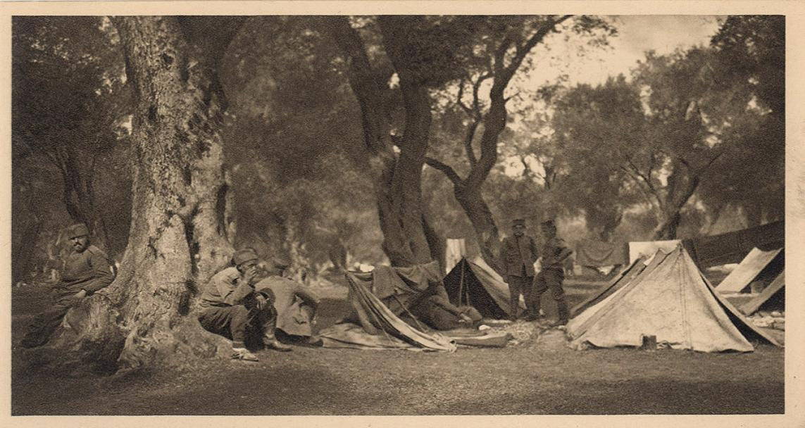 Српска војска на Крфу, фотографија Самсона Чернова објављена у албуму „Петогодишњи рат – Срби 1912-1916“ у Лондону 1916. године.